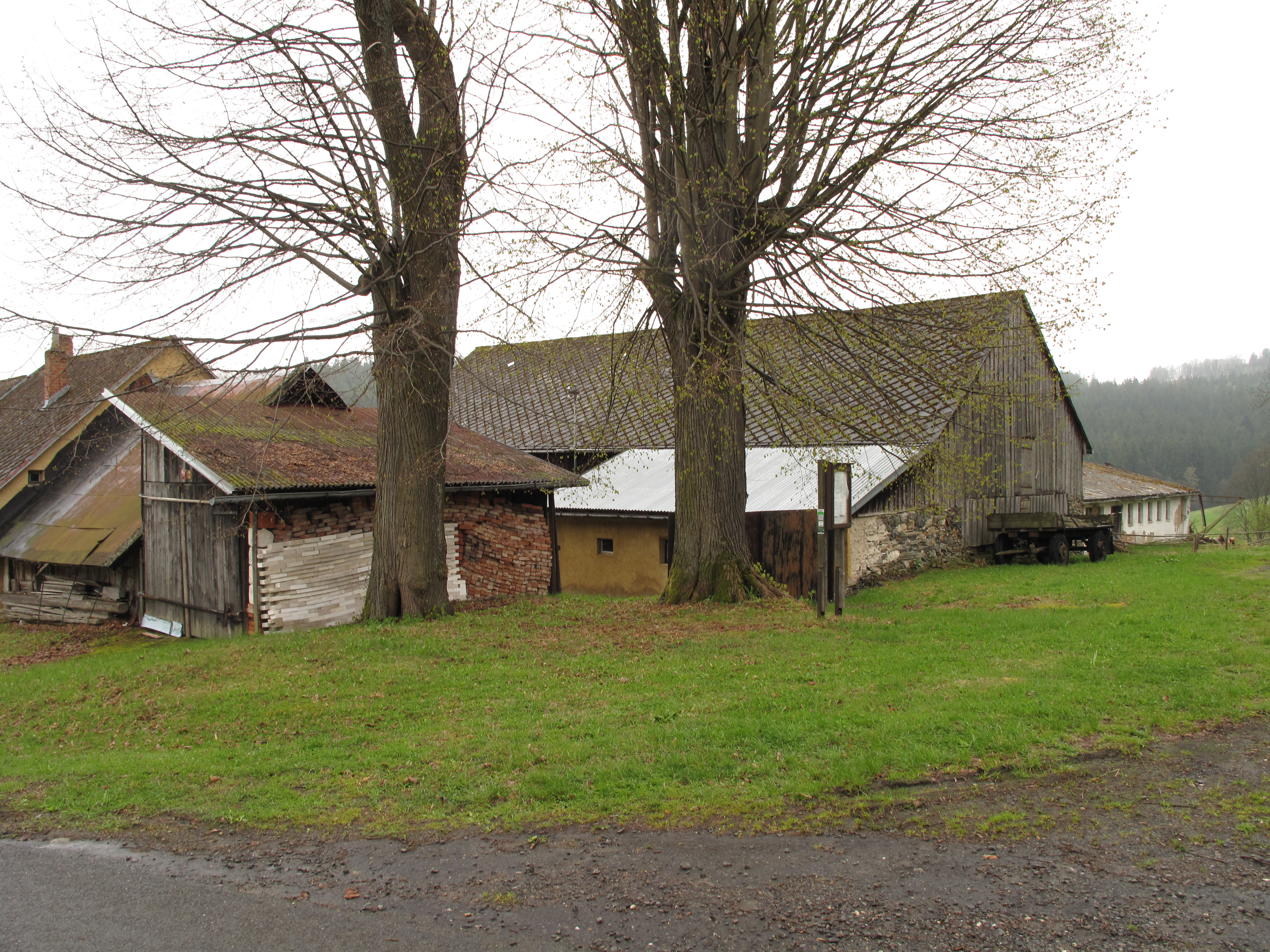 Radvanice (Velhartice). Okres Klatovy, Česká republika.